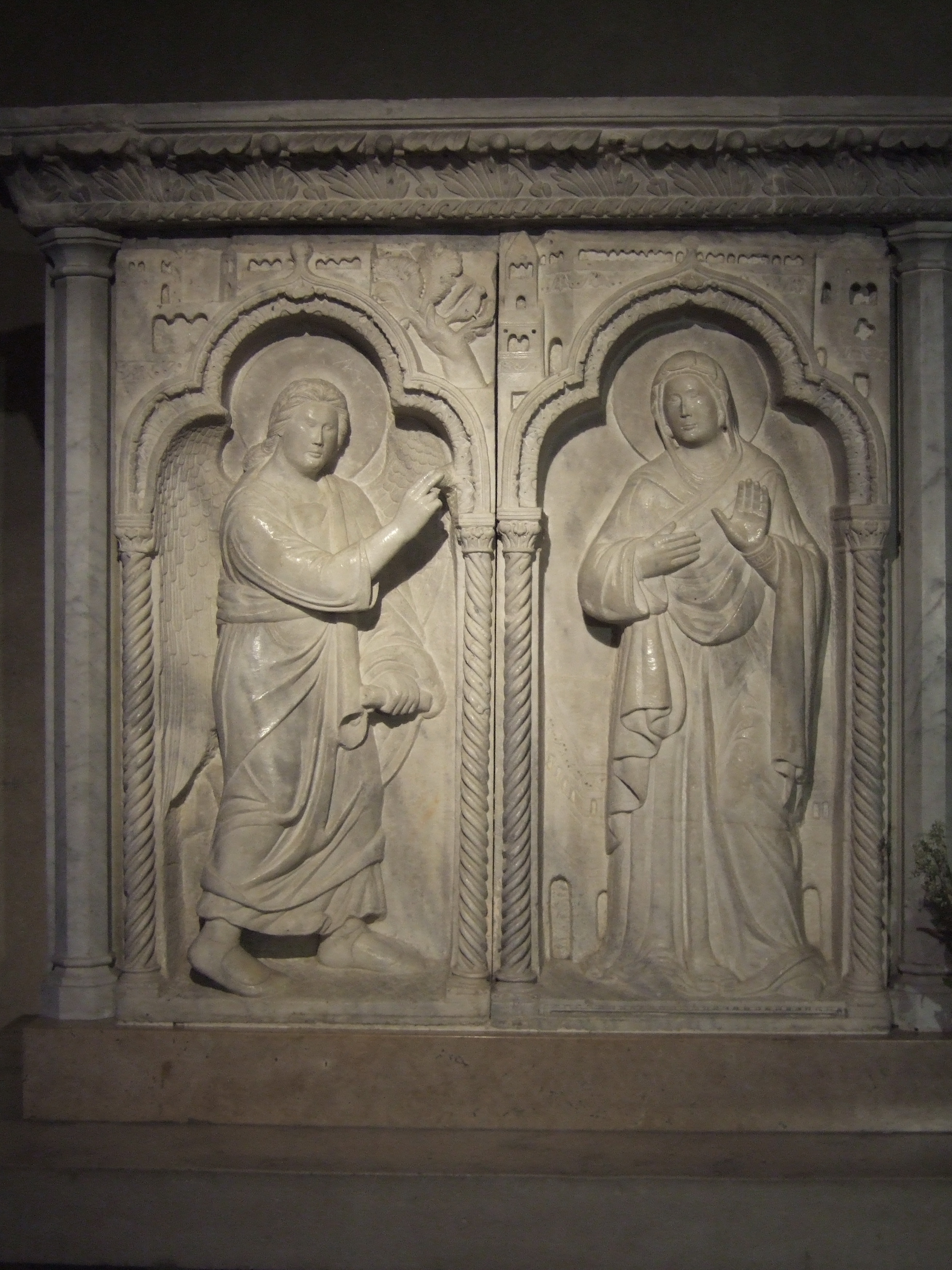 Abbazia di Sesto al Reghena - Annunciazione degli inizi del XIV secolo